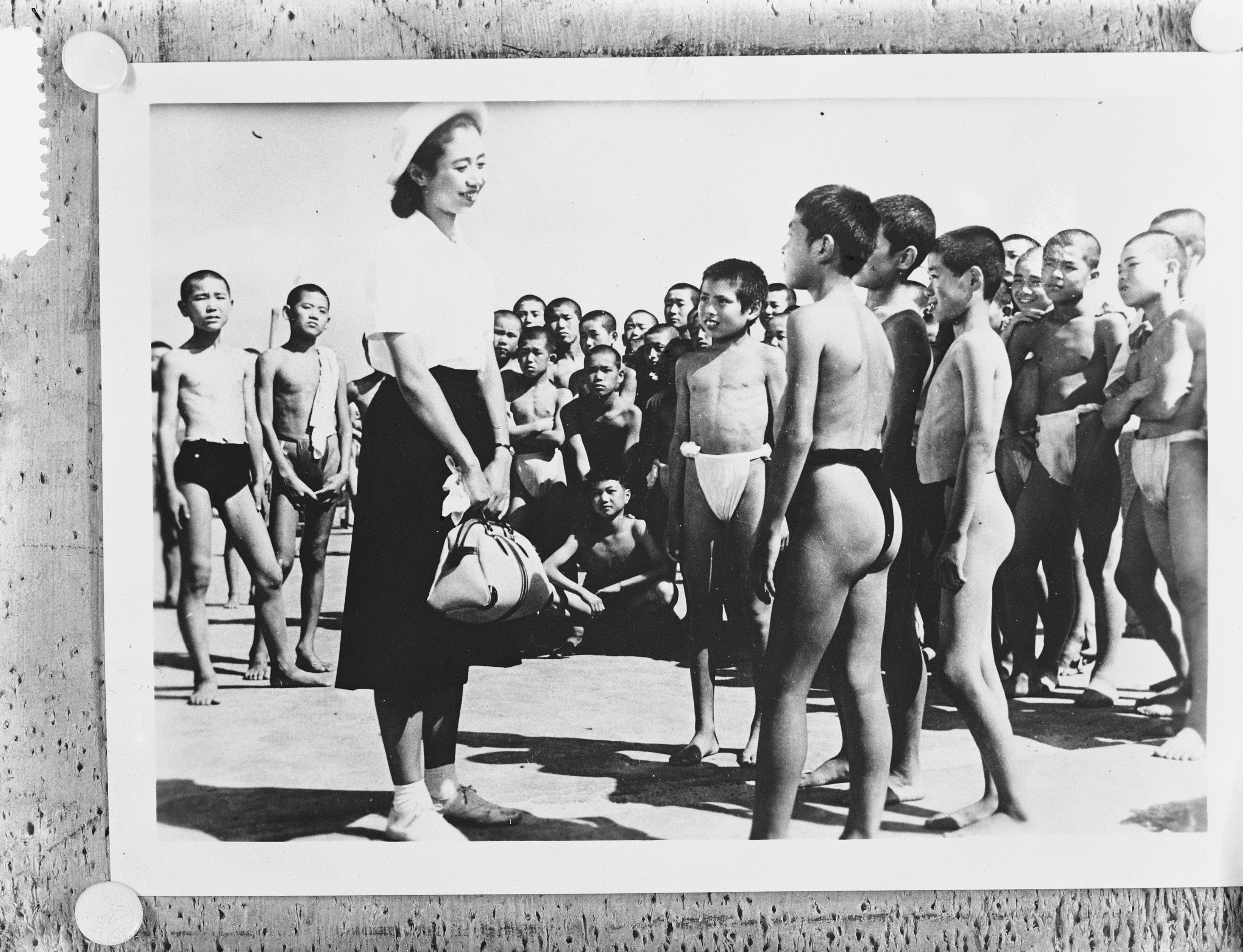 Collectie / Archief : Fotocollectie Anefo Reportage / Serie : [ onbekend ] Beschrijving : Reprodukties Hiroschima (Royal Film) Datum : 4 maart 1954 Locatie : Hiroshima Trefwoorden : FILM, Reprodukties Persoonsnaam : ROYAL Fotograaf : Doka / Anefo Auteursrechthebbende : Nationaal Archief Materiaalsoort : Glasnegatief Nummer archiefinventaris : bekijk toegang 2.24.01.09 Bestanddeelnummer : 906-3242